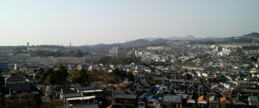 西鈴蘭台（君影町より）